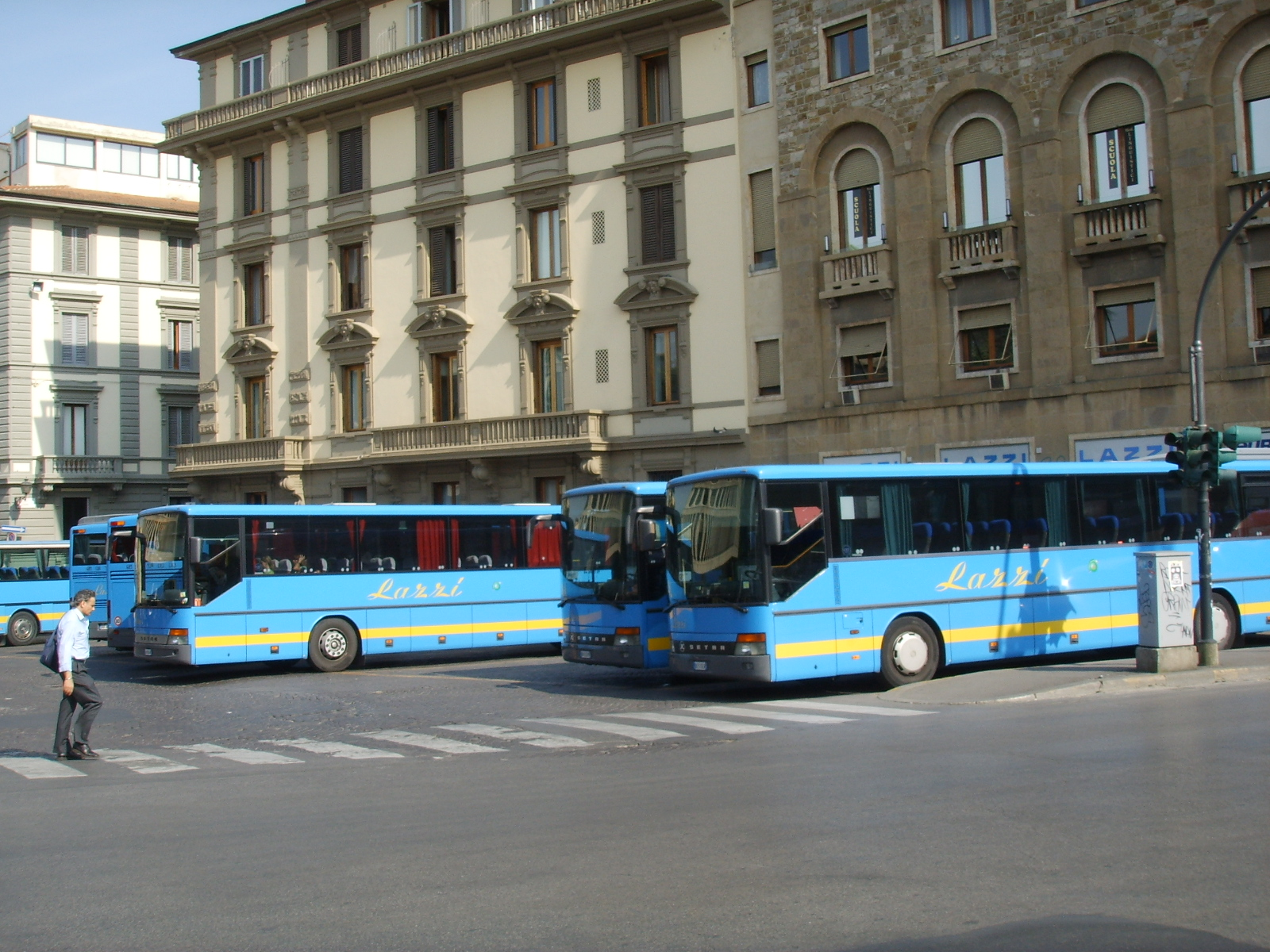 Bus lazzi_piazza_adua in Florence